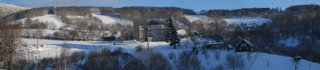 vzhled Janousov mesto